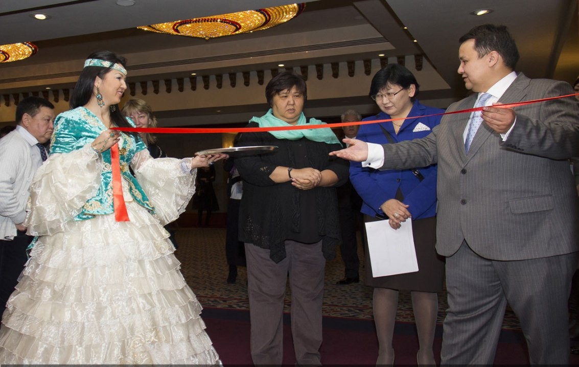 Открытие казахстанской выставки по франчайзингу